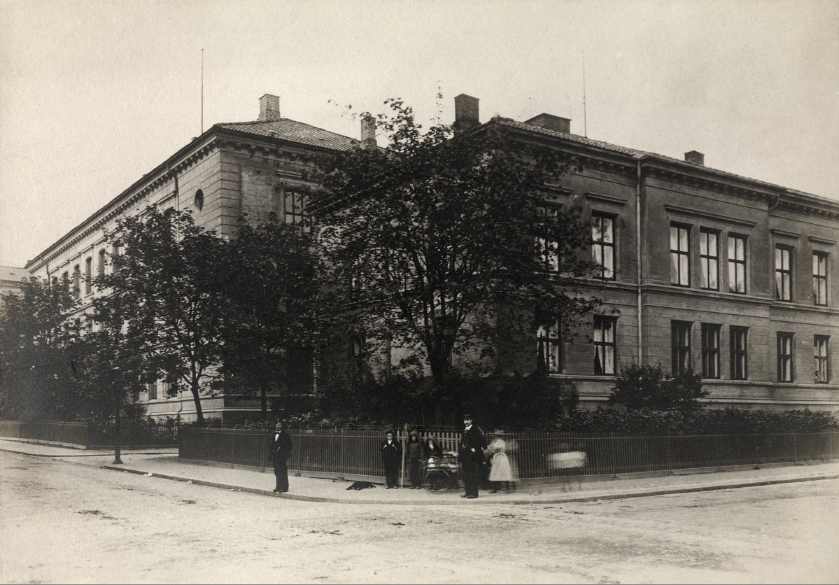 Oslo Borger- og Realskole, hjørnet av Osterhaus' gate og Mariboes gate, 1905